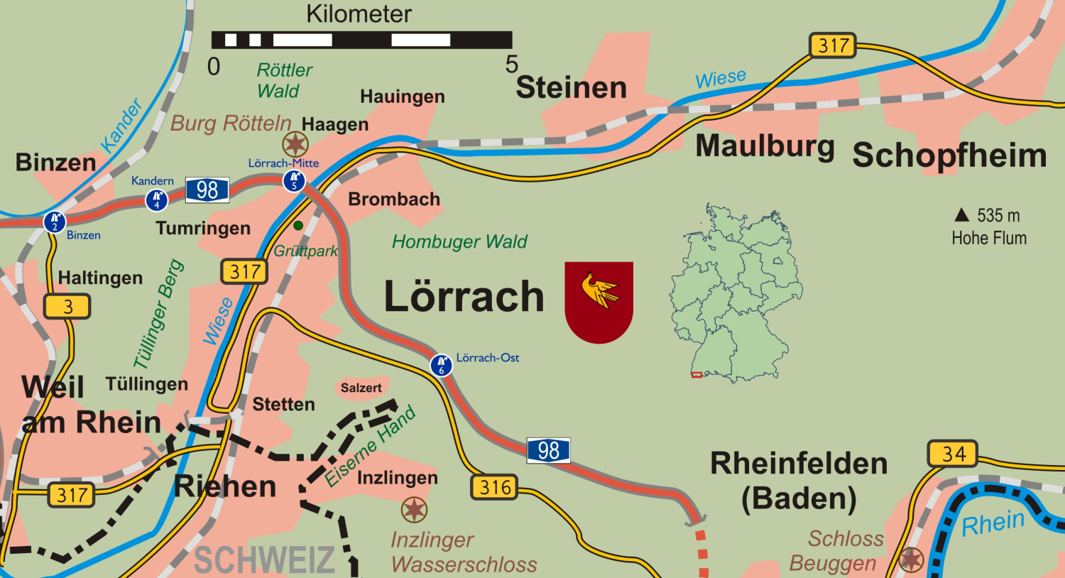 Umgebungskarte Lörrachs mit Eisenbahn und Hauptverkehrsstraßen